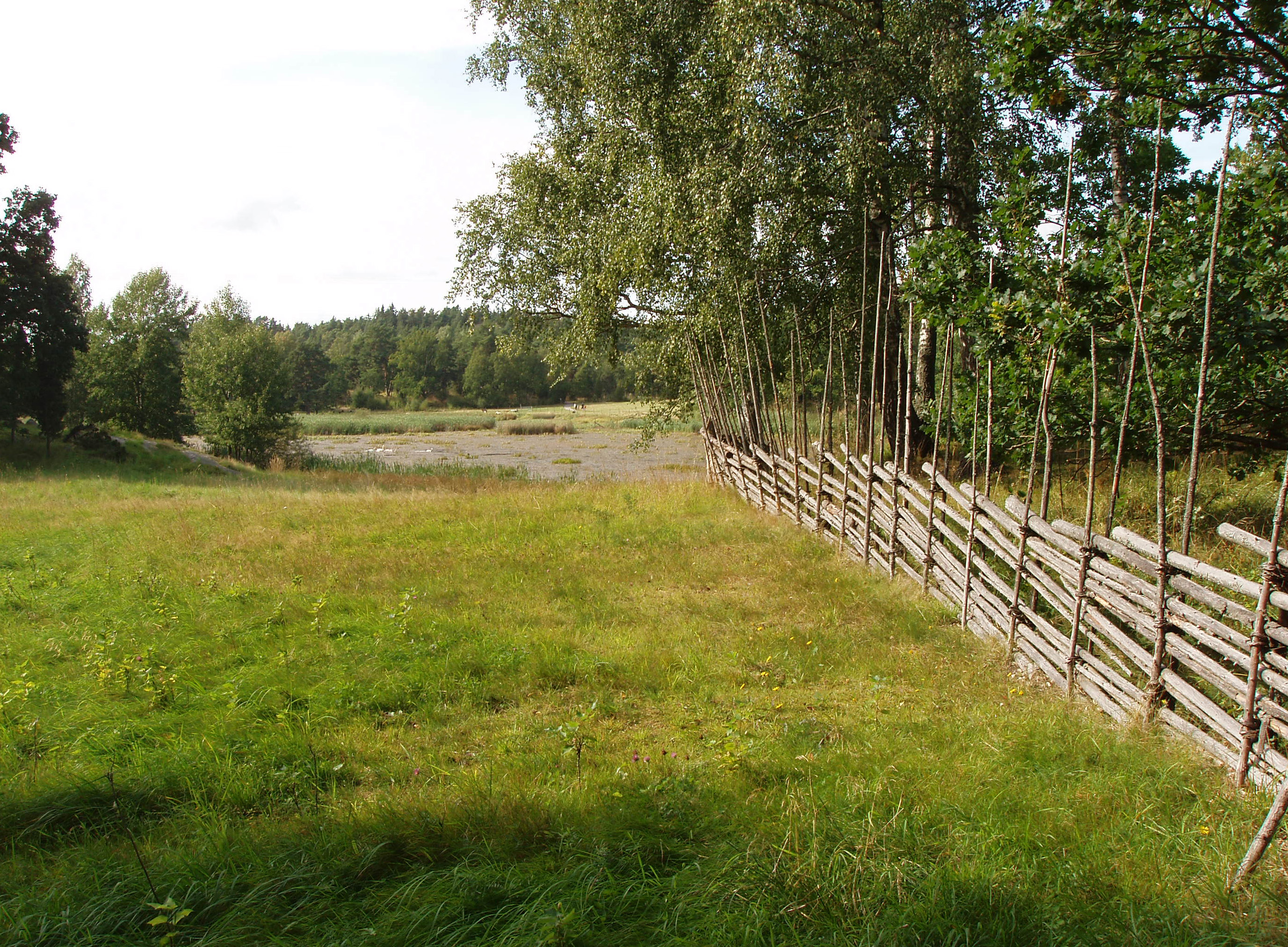 Strandäng med gärdsgård vid Västra Långängskärret på Lidingö.